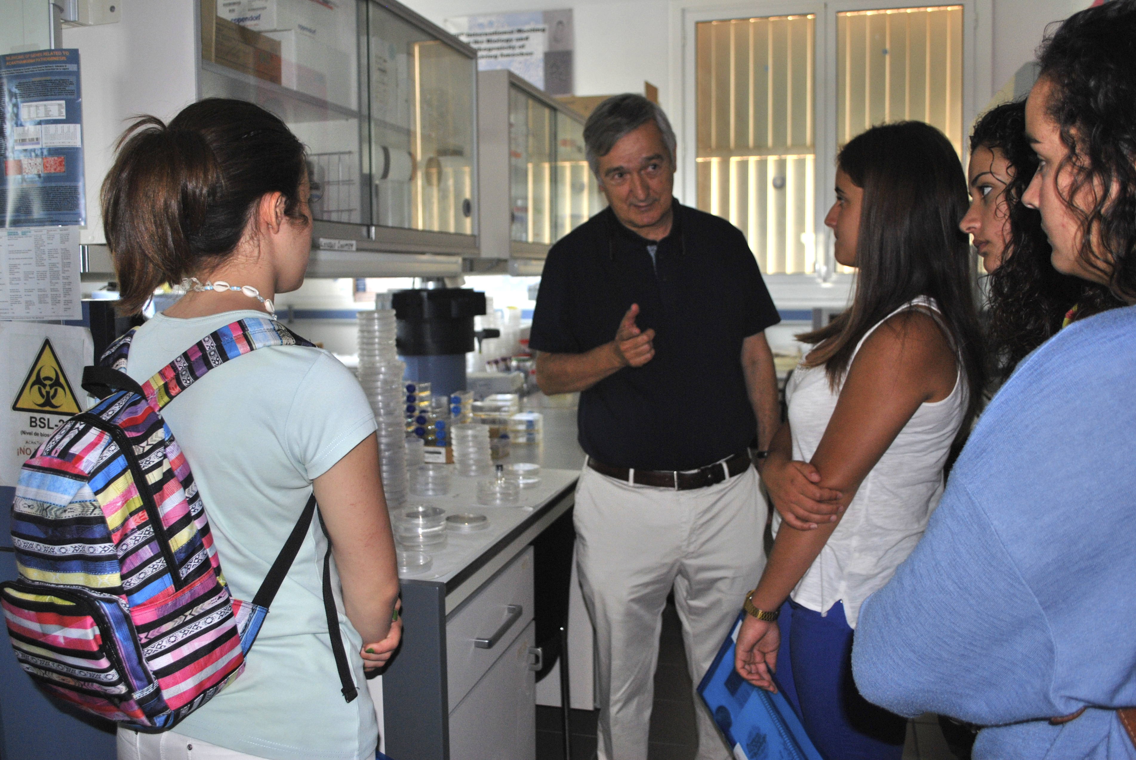 Basilio Valladares Hernández enseña las instalaciones del Instituto Canario de Enfermedades Tropicales a un grupo de jóvenes alumnos.